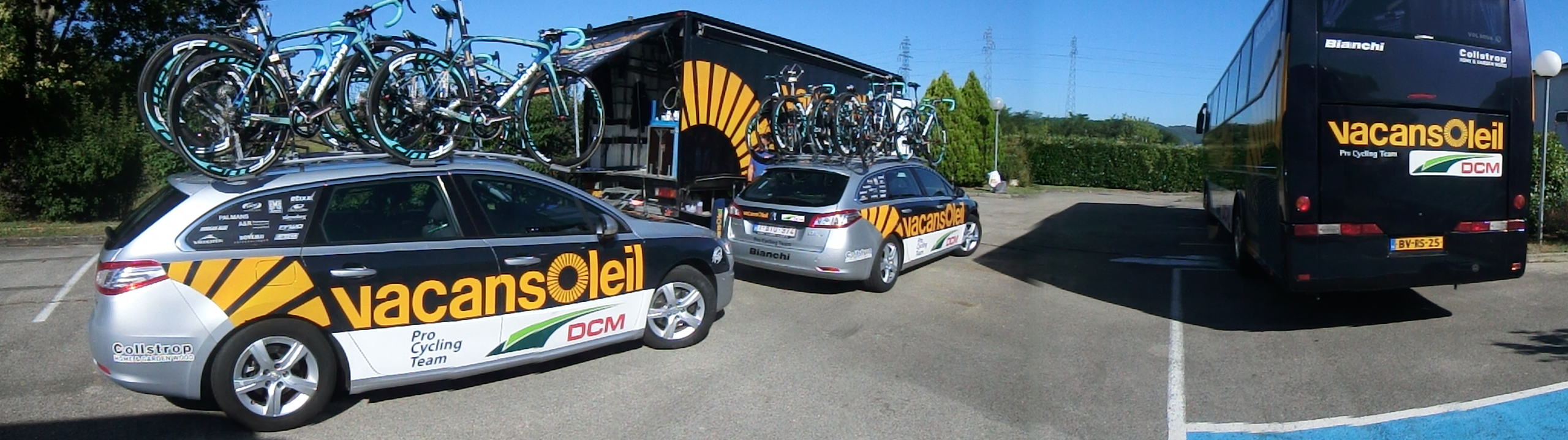 Les véhicules Vacansoleil au matin de la troisième étape du Tour de l'Ain 2013.